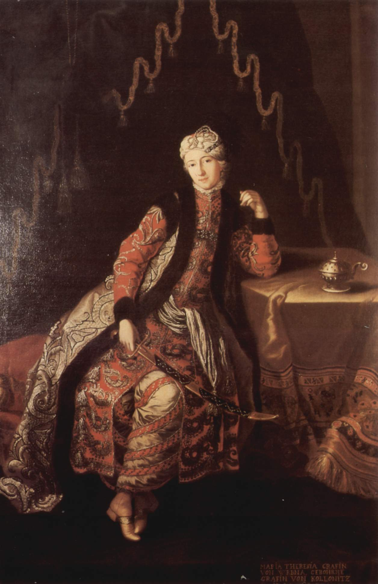 Porträt des Goldschmieds und Orientreisenden Jean-Baptiste Tavernier